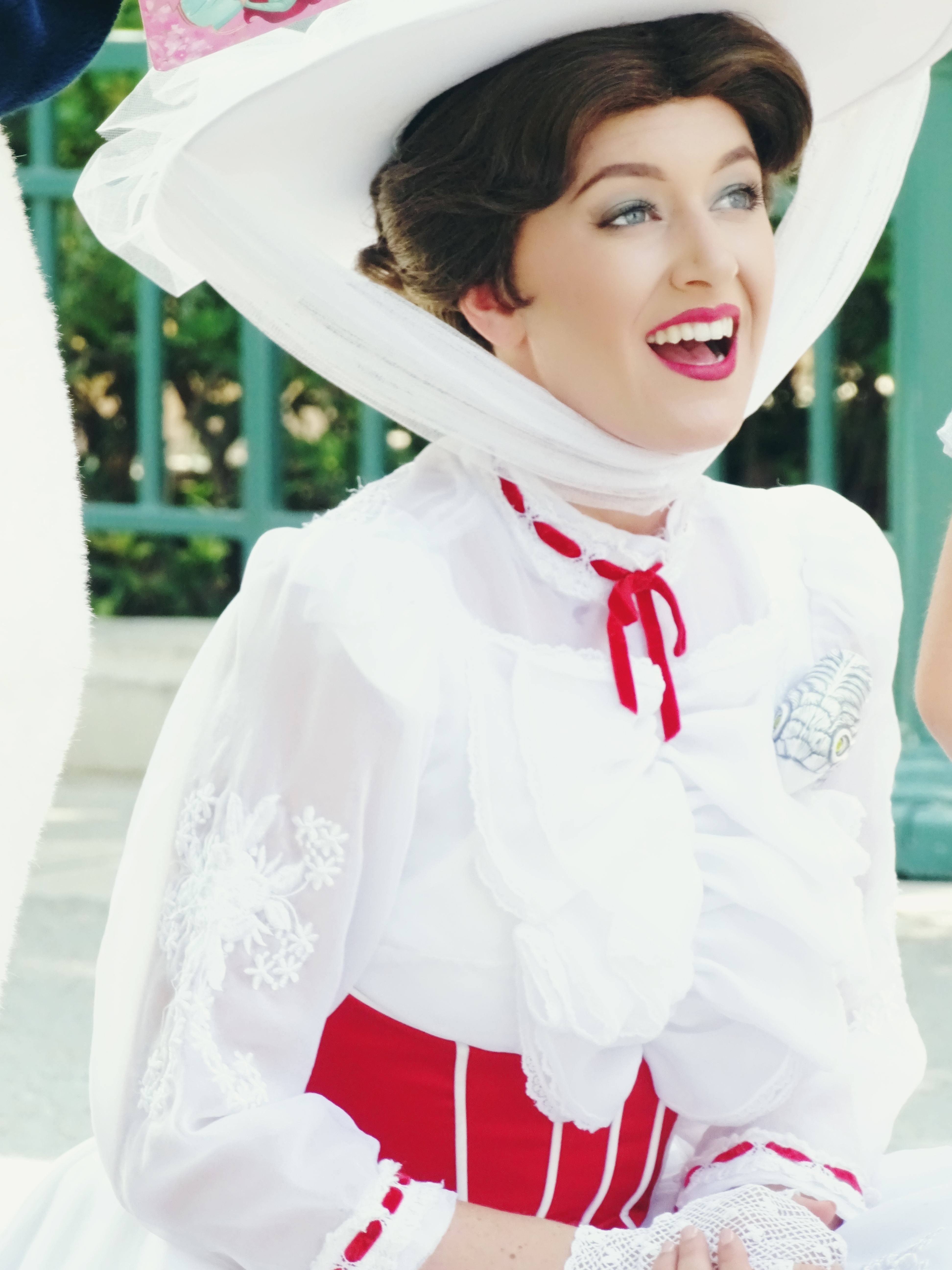 Mary Poppins rencontrant les visiteurs sur la Place des Frères Lumière - Front Lot, Walt Disney Studios